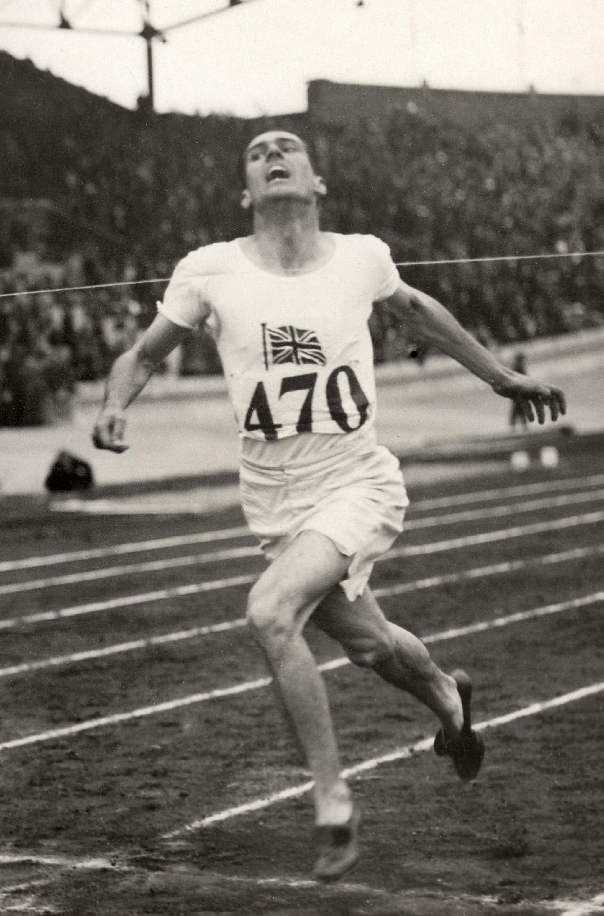 Sport, Olympische Spelen Amsterdam, 1928 : De Brit Douglas Lowe wordt olympisch kampioen op de 800 meter hardlopen (mannen).